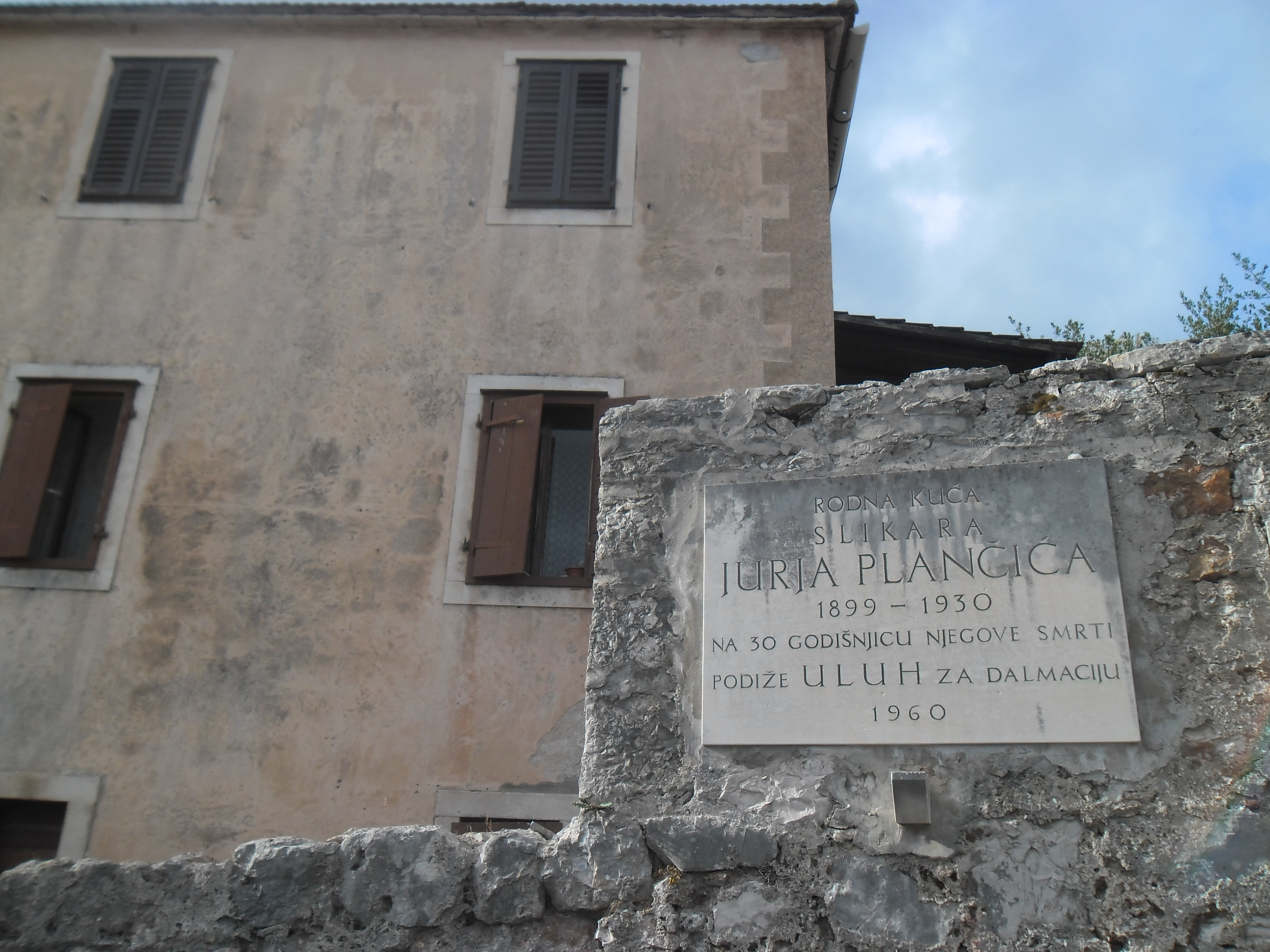 otok Hvar